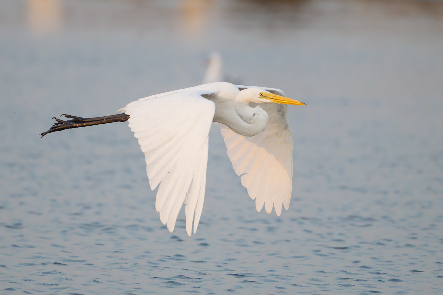 Large Egret (Ardea alba), Laem Pak Bia, Petchaburi, Thailand